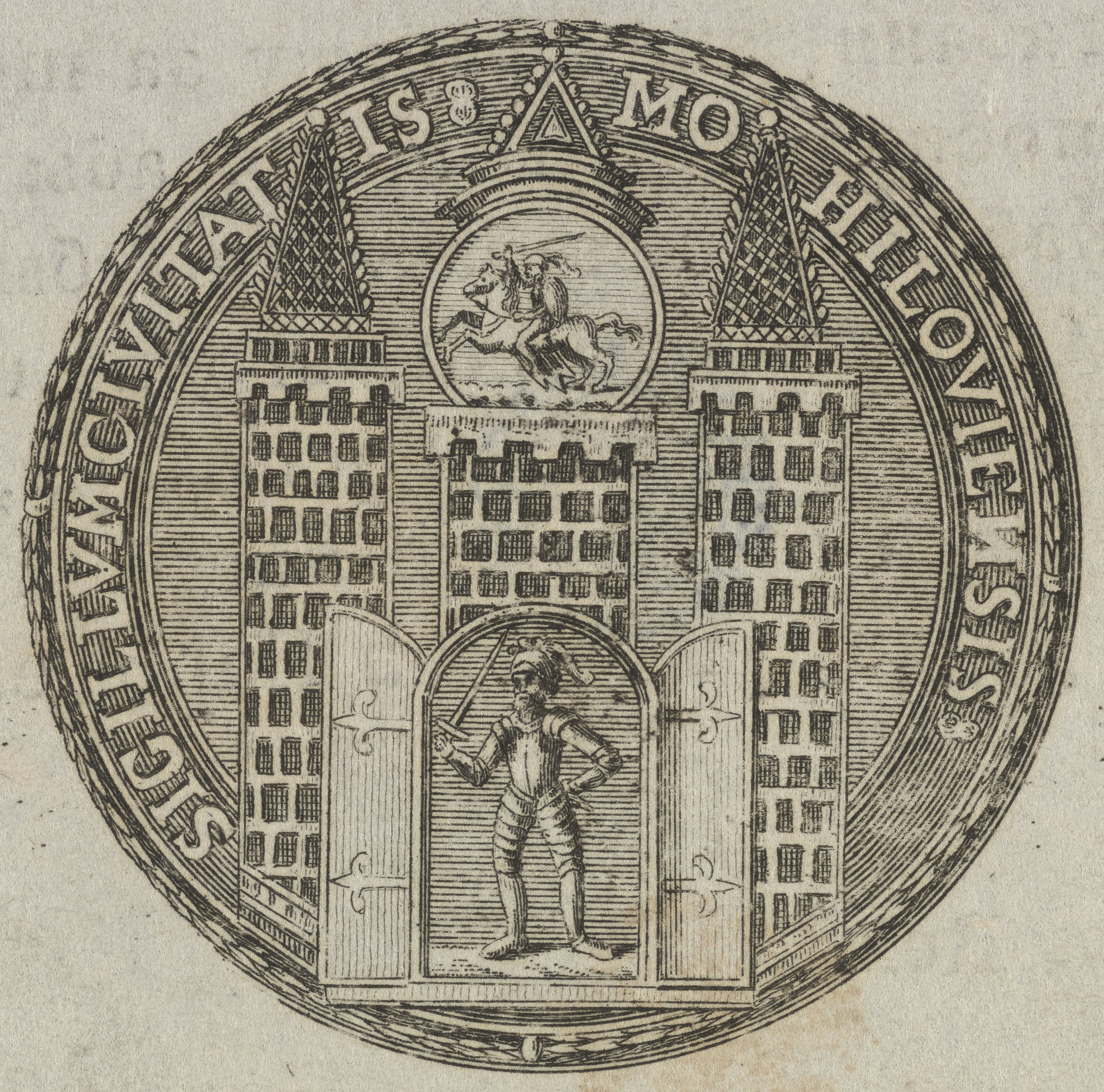 Беларуская (тарашкевіца): Герб Магілёва (Mahiloŭ) з «Пагоняй» («Pahonia»)